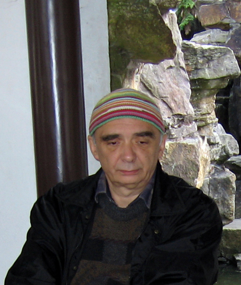 Андрей Монастырский. Фото Сабина Хэнсген, Бохум, 1999